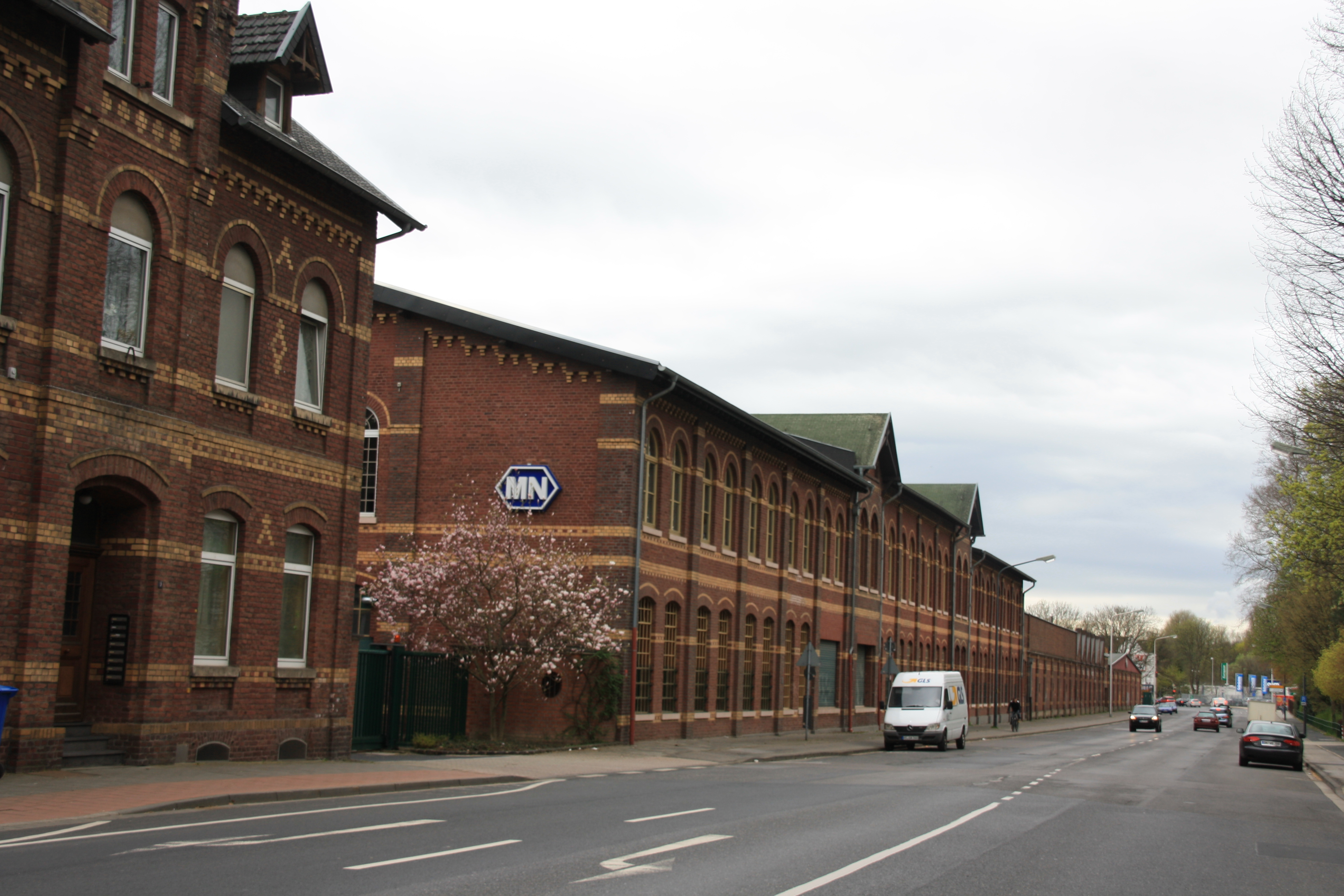 Verwaltungsgebäude der ehem. Feintuchfabrik Leopold Schoeller in Düren (links)